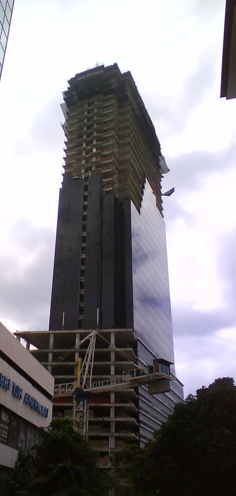 Tower financial center, ciudad de Panamá, Panamá.